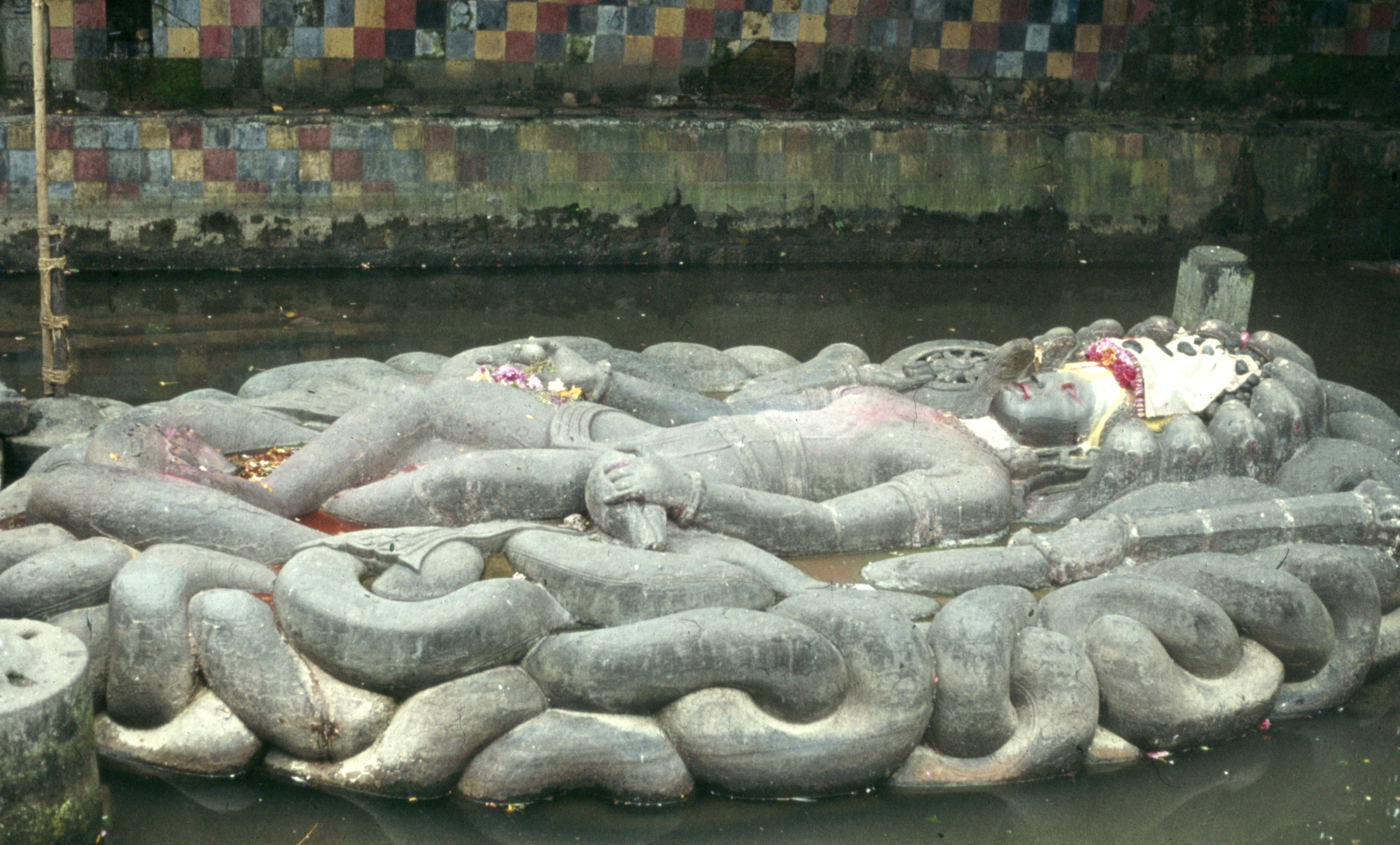 Budhanilkantha, Vishnu auf Naga, 1976